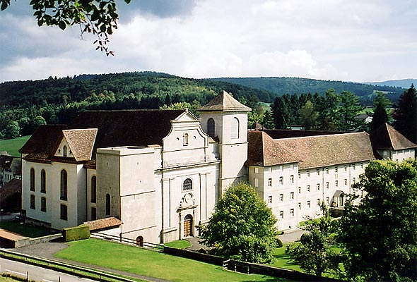 Ehemalige Klosterkirche von Bellelay